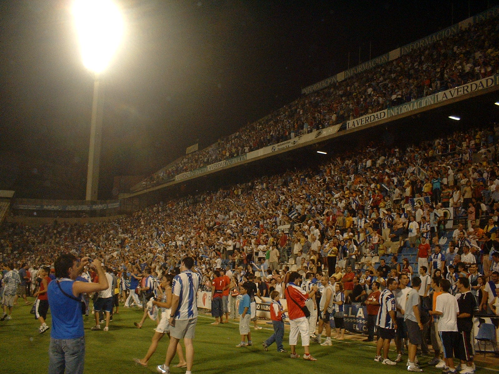 Hercules